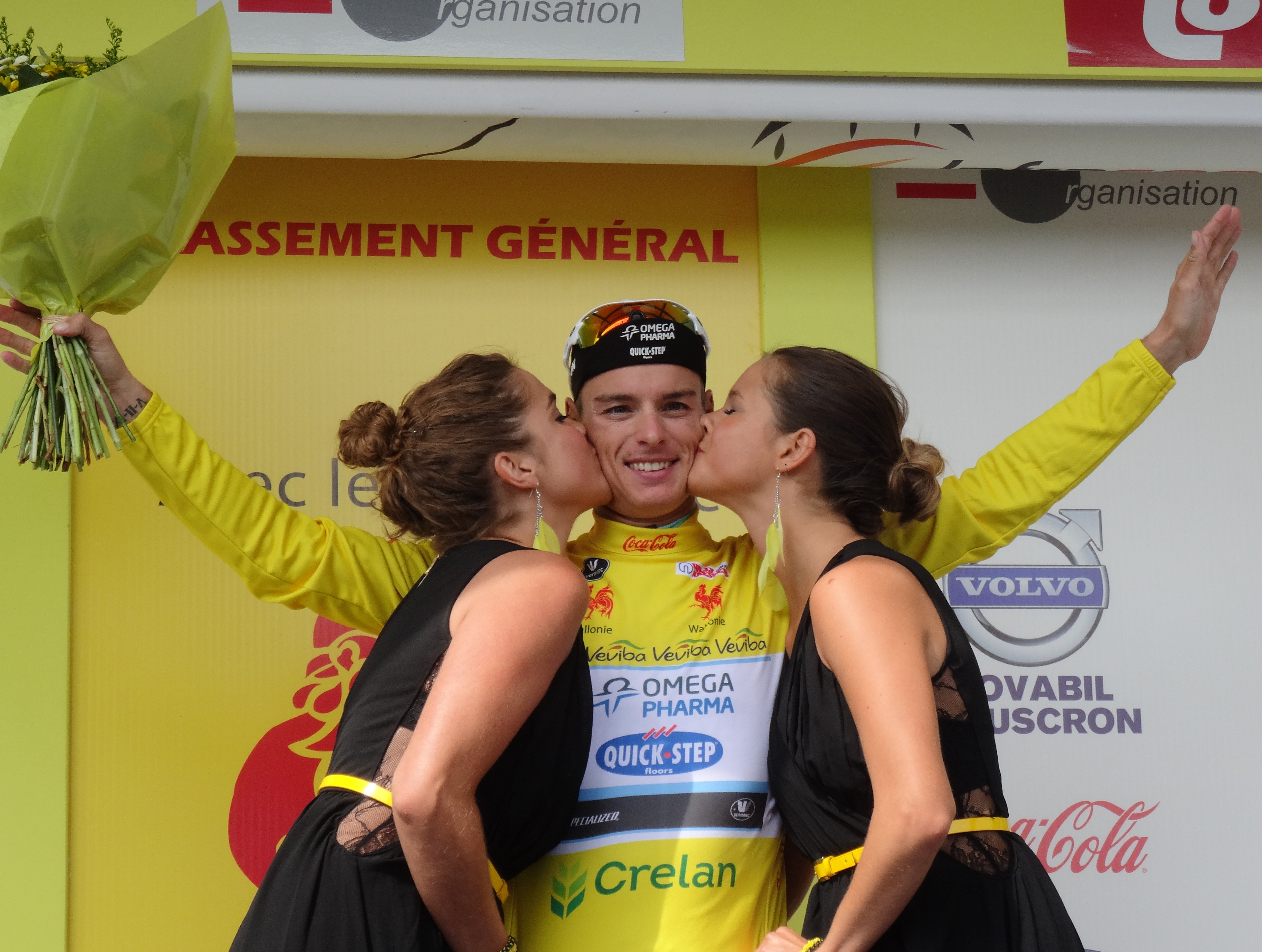 Reportage photographique réalisé le mercredi 30 juillet à l'occasion de l'arrivée de la cinquième et dernière étape du Tour de Wallonie 2014 à Alleur (Ans), Belgique.